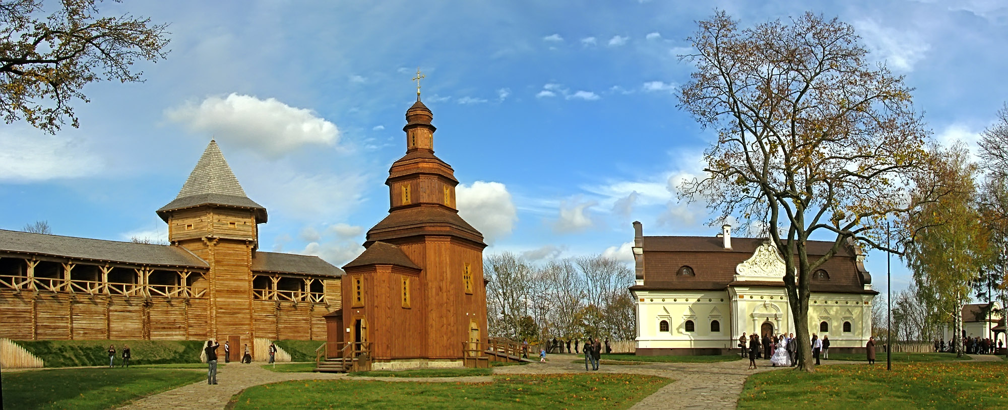 Поселення укріплене багатошарове «Батуринська фортеця», Батурин, між вулицями Партизанська, Петровського, Радянської та провулками Партизанськім і Петровського